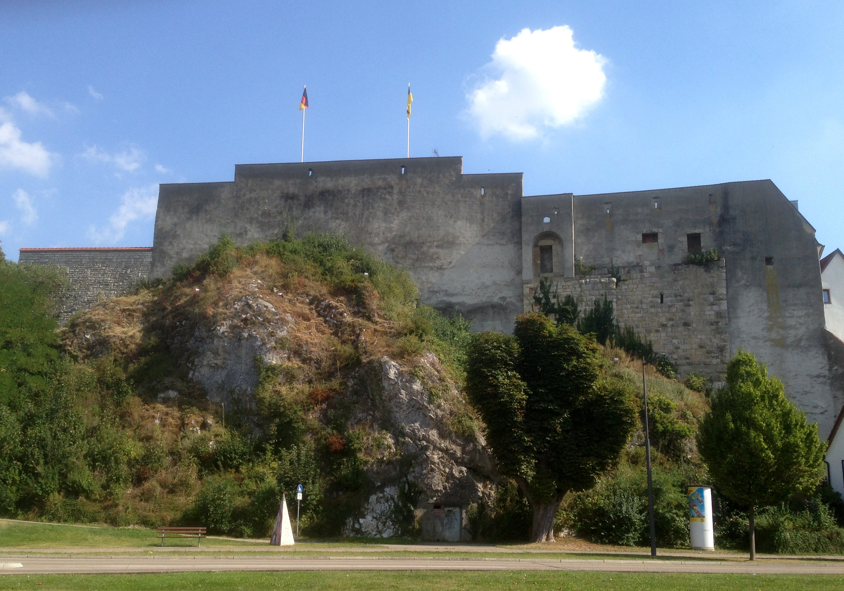 Reste der Stadtmauer mit stauferzeitlichen Buckelquadern in der Burgstraße in Giengen an der Brenz